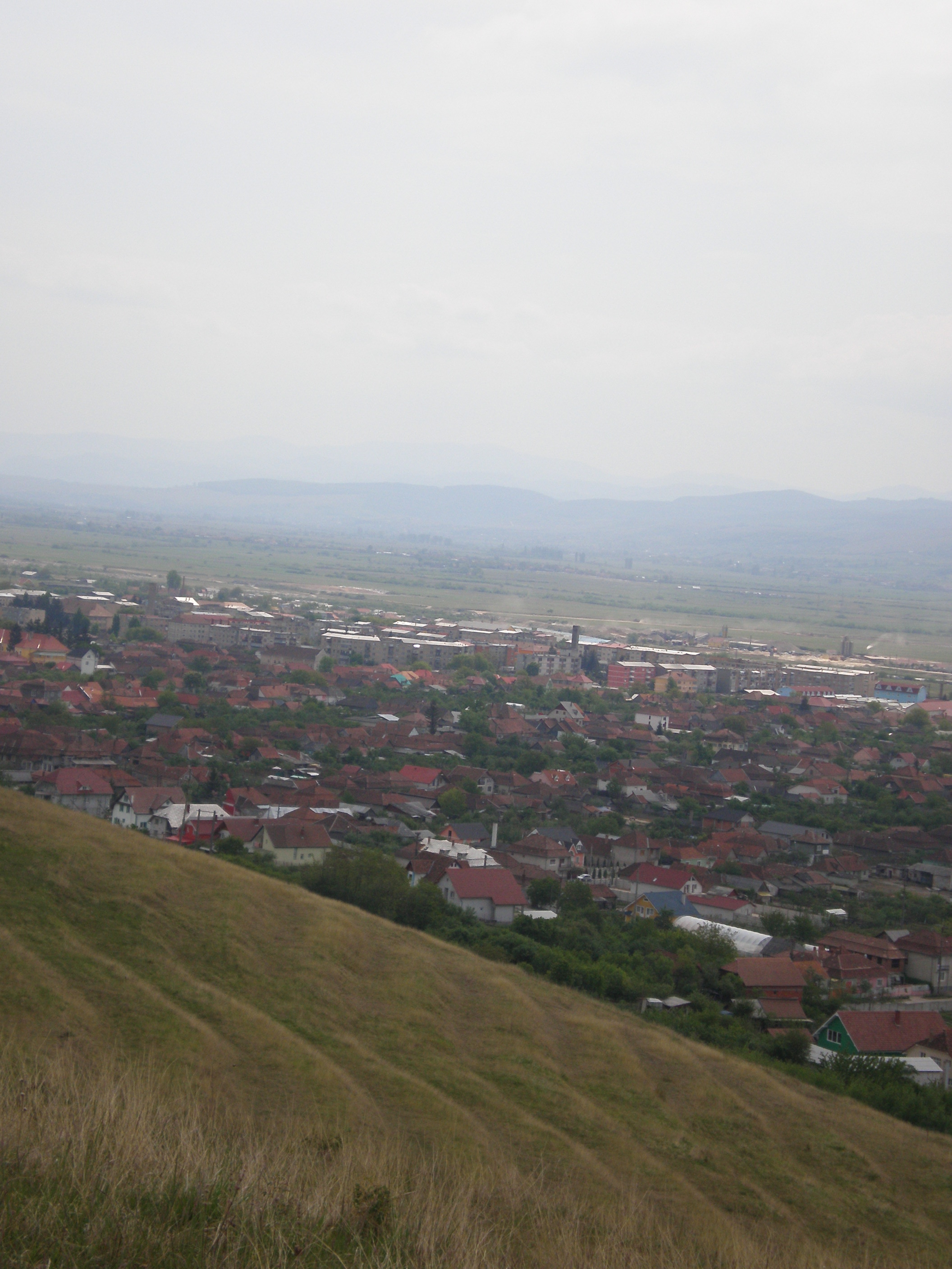 Élesd látképe (Élesd, Bihar megye, Románia)